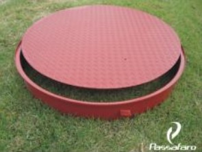 Street Manhole